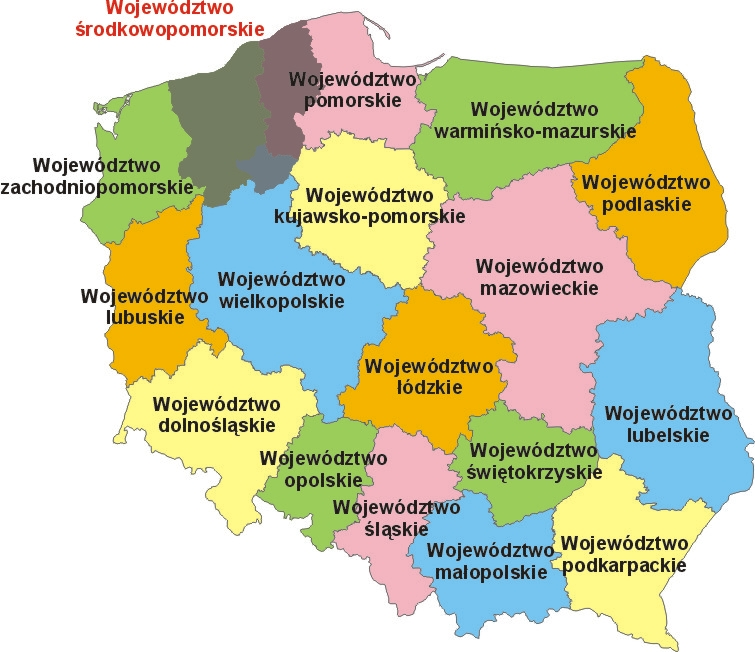 Mapa administracyjna Polski z zaznaczonym zasięgiem projektowanego województwa środkowopomorskiego. Autor: Aotearoa